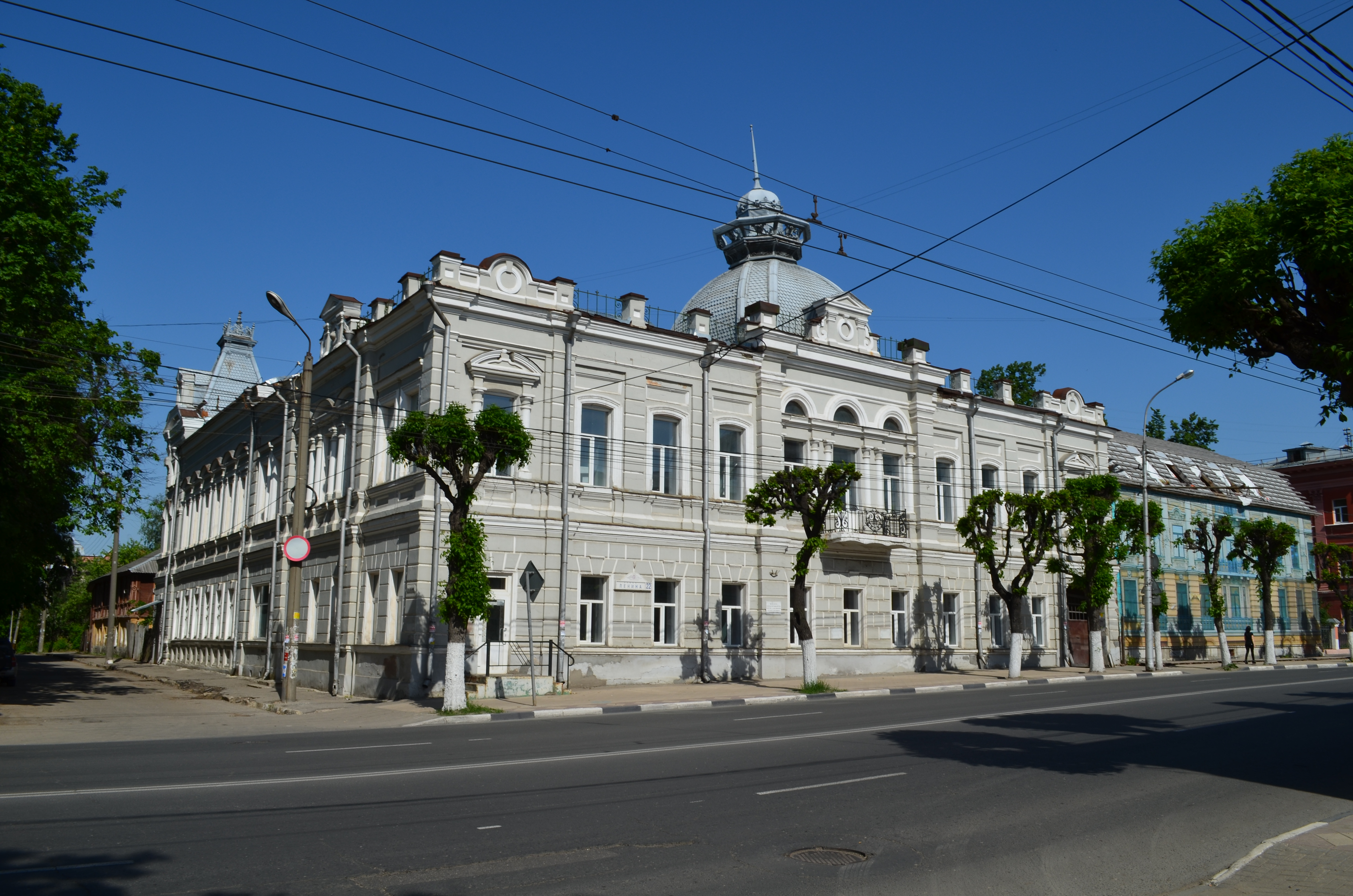 Рязань,ул.Ленина,д.22.